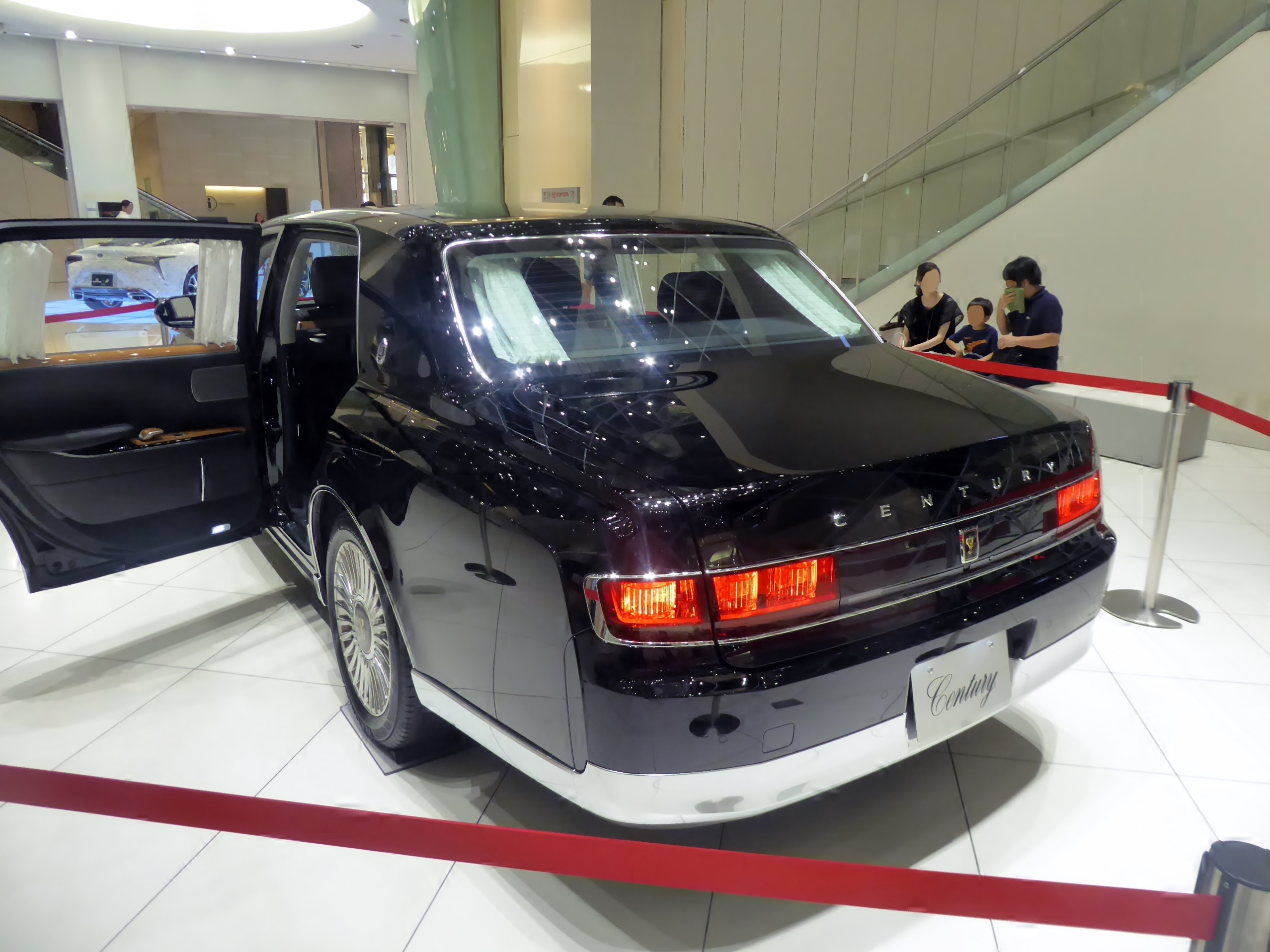 DAA-UWG60-AEXGH型トヨタ・センチュリーをリアから撮影。